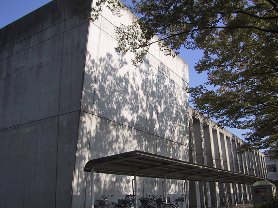 Toyo University Asaka Campus Community Center(東洋大学朝霞キャンパスコミュニティセンター（サークル棟）)